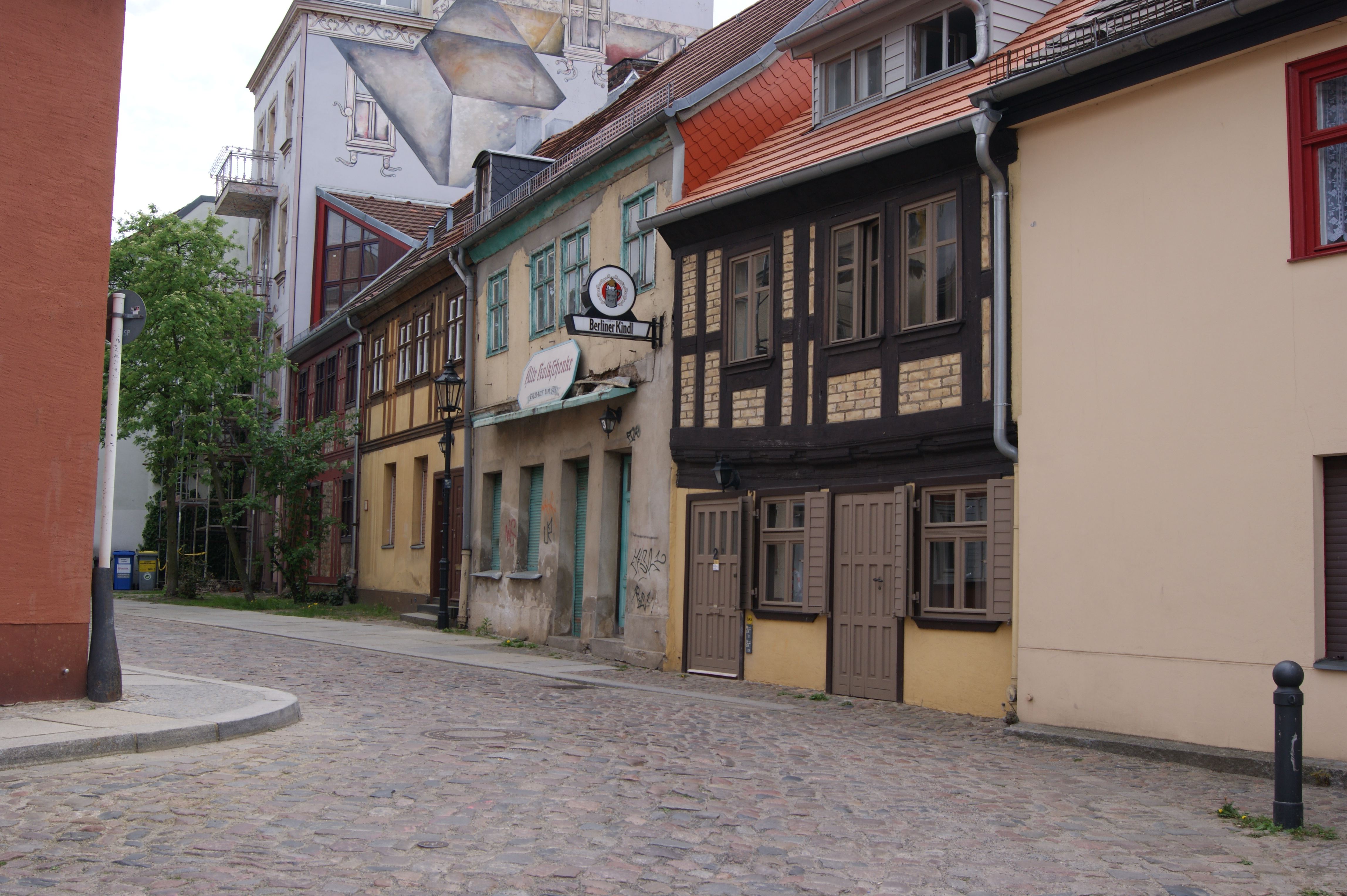 Kolk, Berlin-Spandau